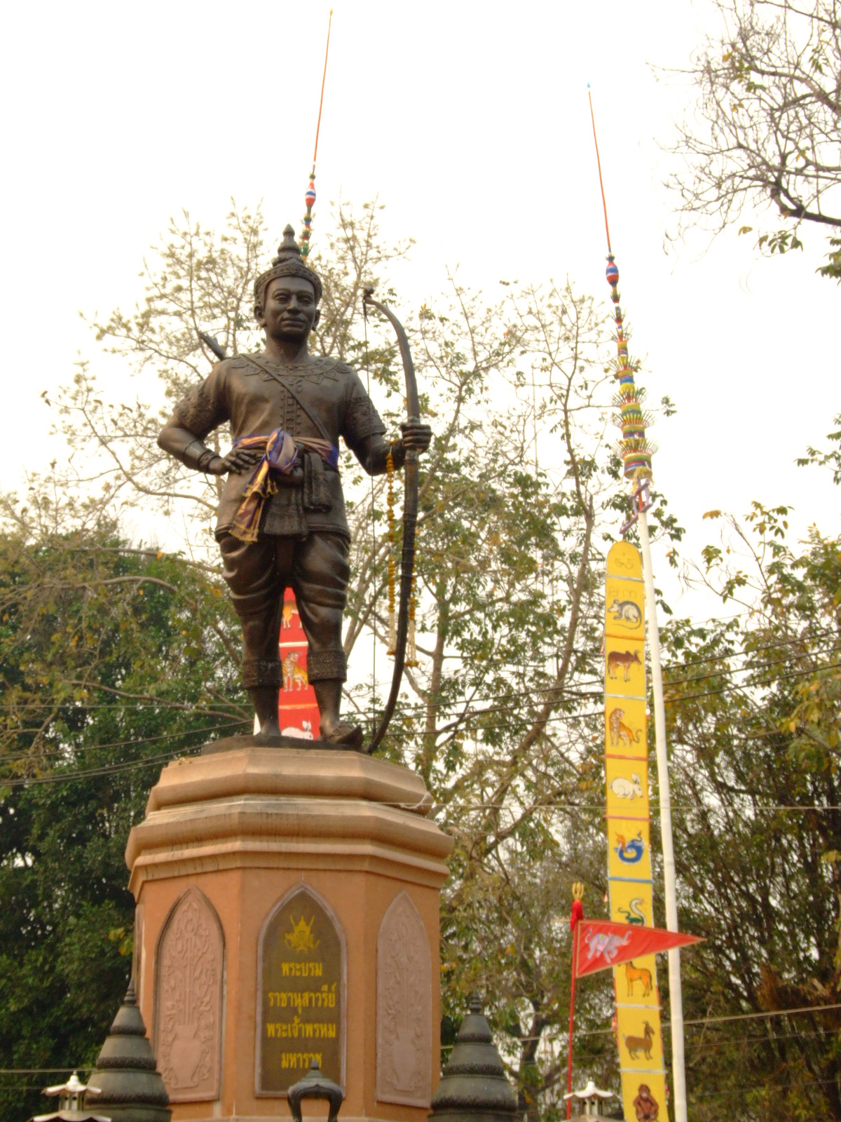 พระราชานุสาวรีย์ พระเจ้าพรหมมหาราช สัญญาอนุญาต The present photo is taken or owned by Thanyakij. The camera used was: Fujifilm Finepix S9500.